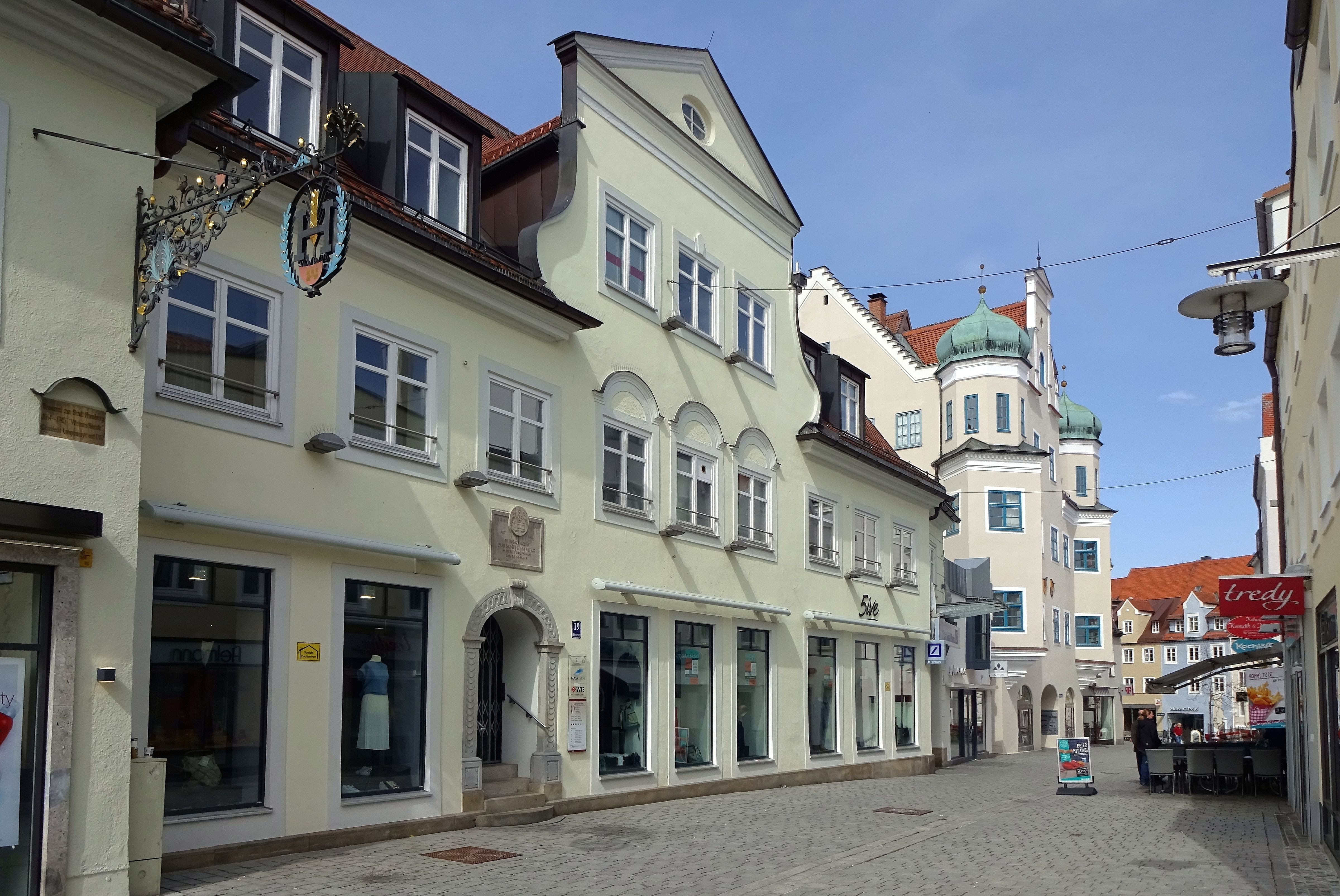 Das Gebäude der ehemaligen Brauerei Zur Stadt Hamburg im April 2016